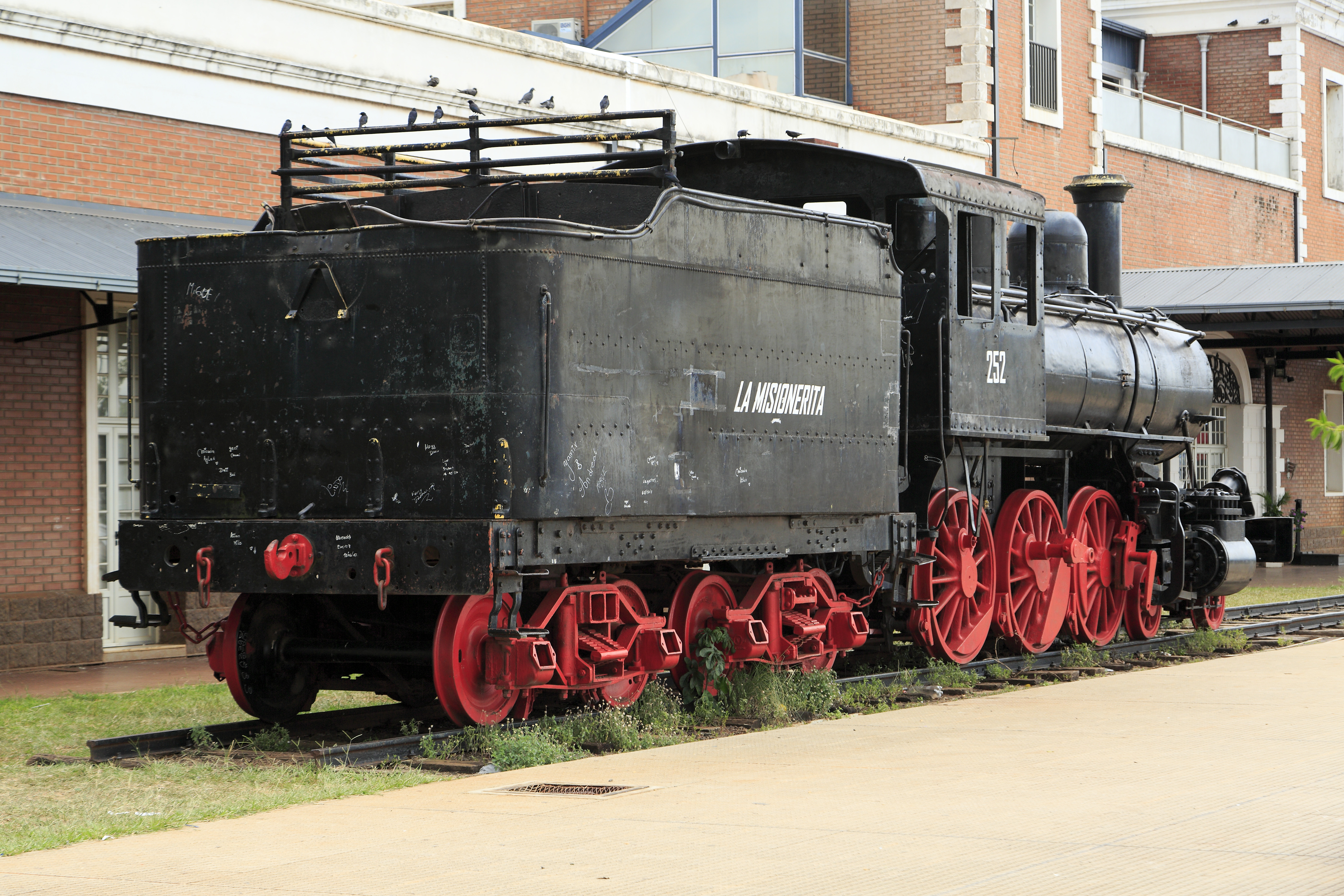 Die südliche der beiden Lokomotiven auf dem alten Bahnhofsgelände, Tendereite. Beide Lokomotiven gehören zur selben Bauart mit der Achsfolge 2’C n2. Der Gitteraufsatz auf dem Tender lässt auf Holzfeuerung schließen.